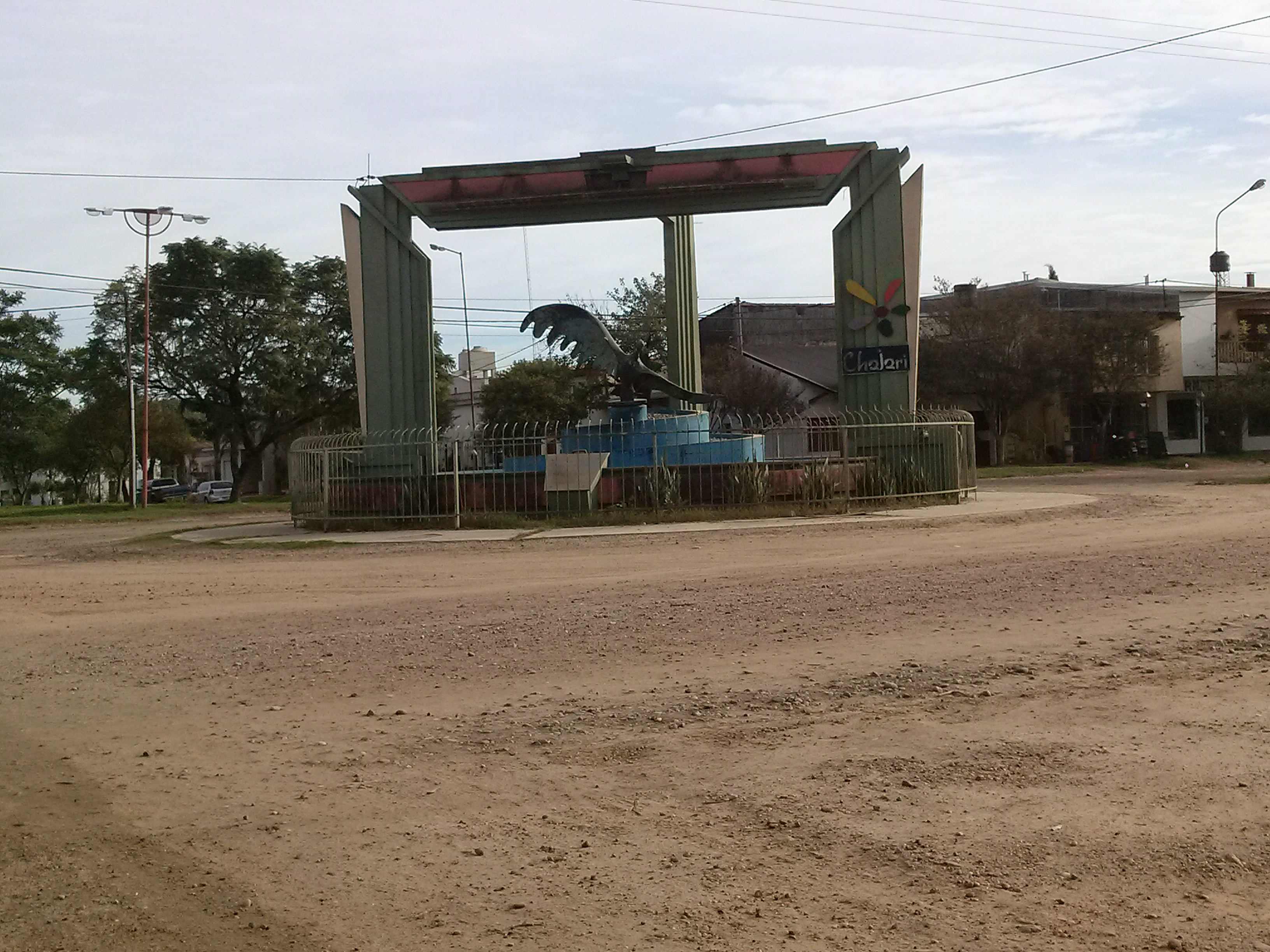 La misma está ubicada en el centro de la intersecciones de la Av. 25 de Mayo y Av. 9 de Julio en el barrio chajariense "Santa Rosa". Detrás se puede ver la Parroquia Santa Rosa de Lima.